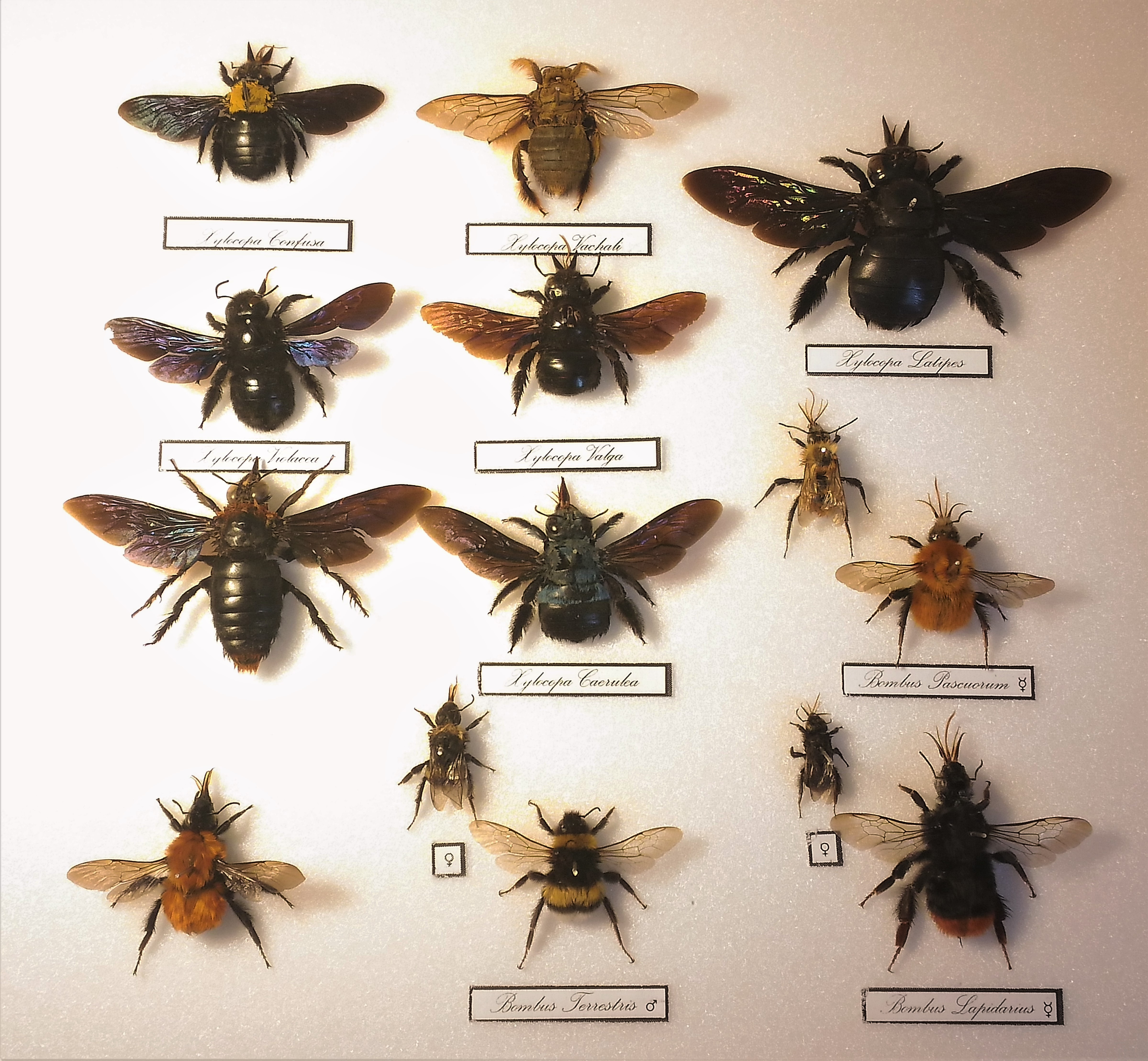 Composizione di esemplari appartenenti al genere Xylocopa e Bombus.